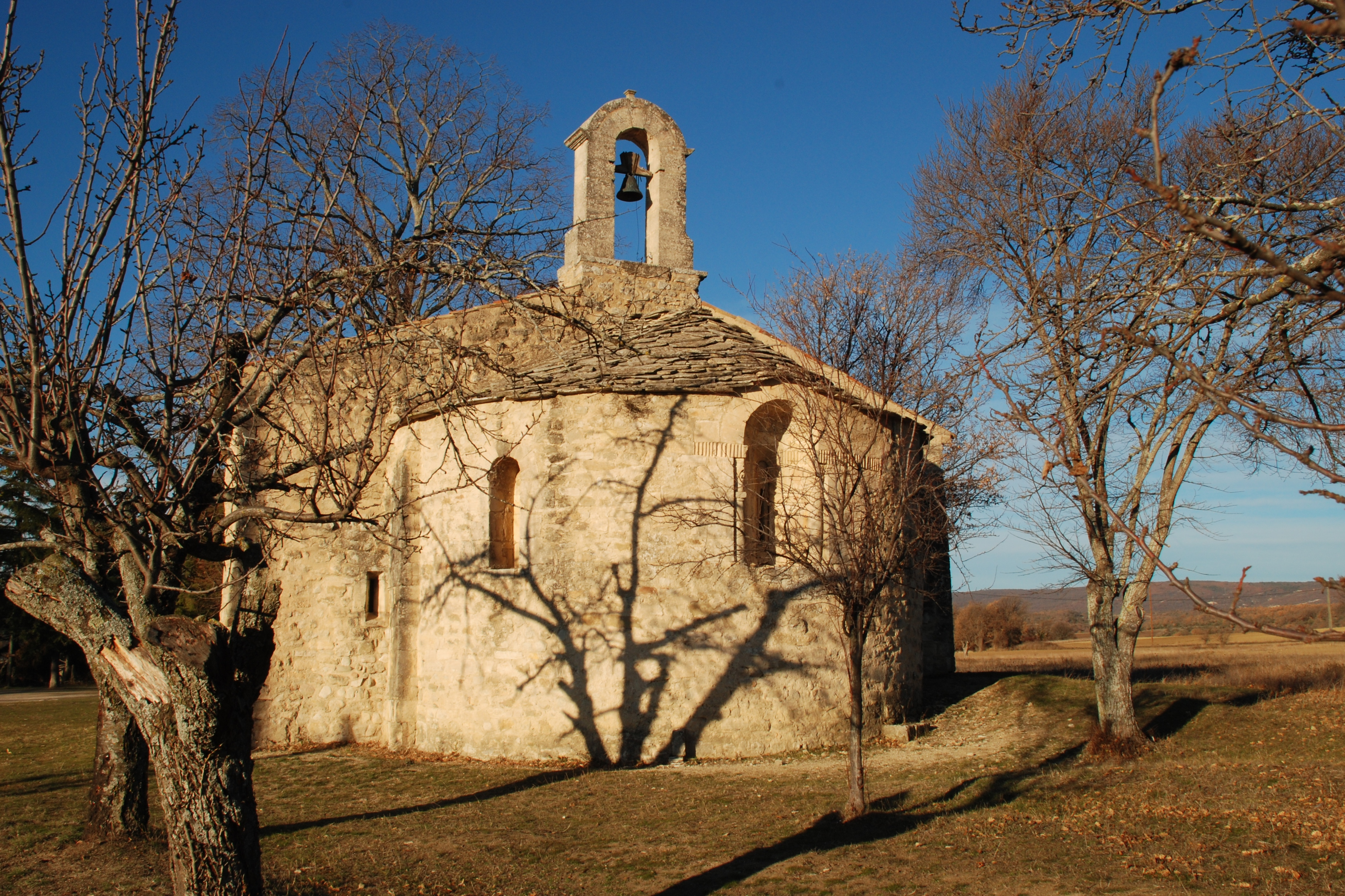 France - Provence - Chapelle Saint-Pierre de Pierrerue